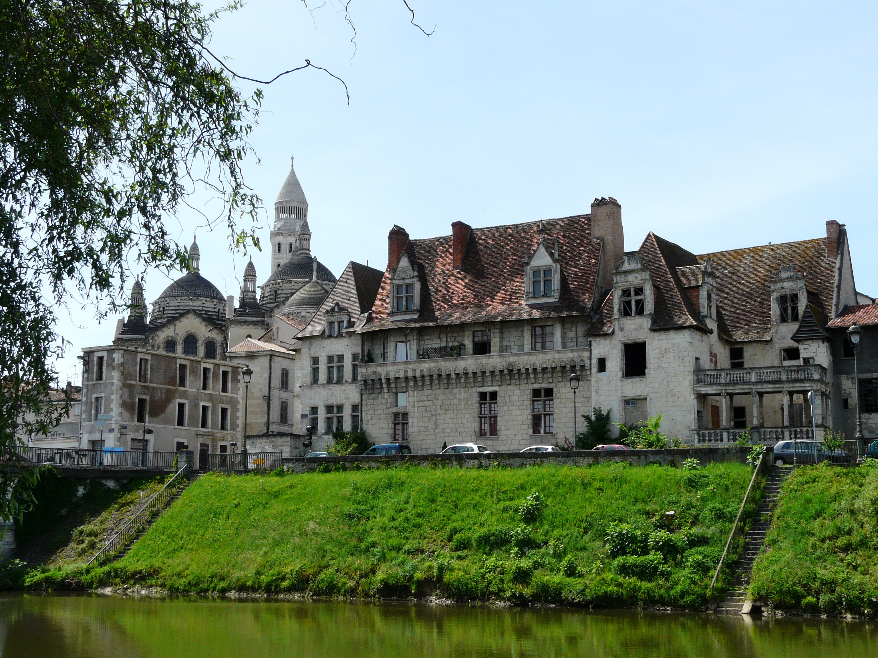 Les bords de l'Isle à Périgueux, Dordogne, France. De gauche à droite, les coupoles et le clocher de la cathédrale Saint-Front, l'hôtel Salleton, la maison des Consuls et la maison Lambert.